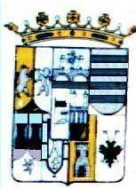 Éste es el escudo de Calzada de Tera